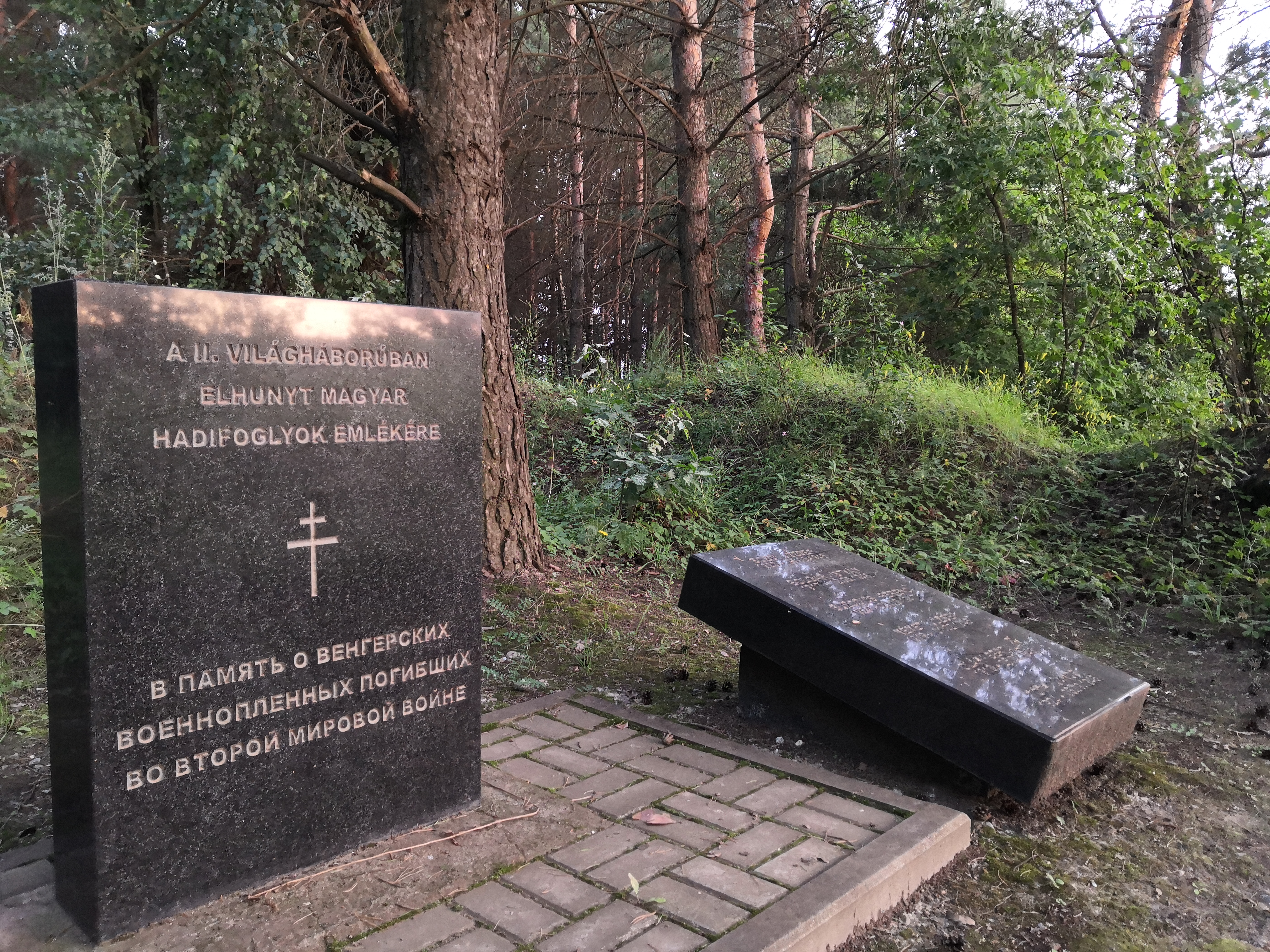 памятник, вторая мировая война, Серпуховский район, мирный